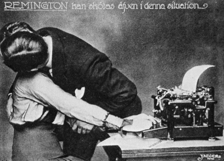 Reklam för Remington skrivmaskin: "Remington kan skötas även i denna situation"